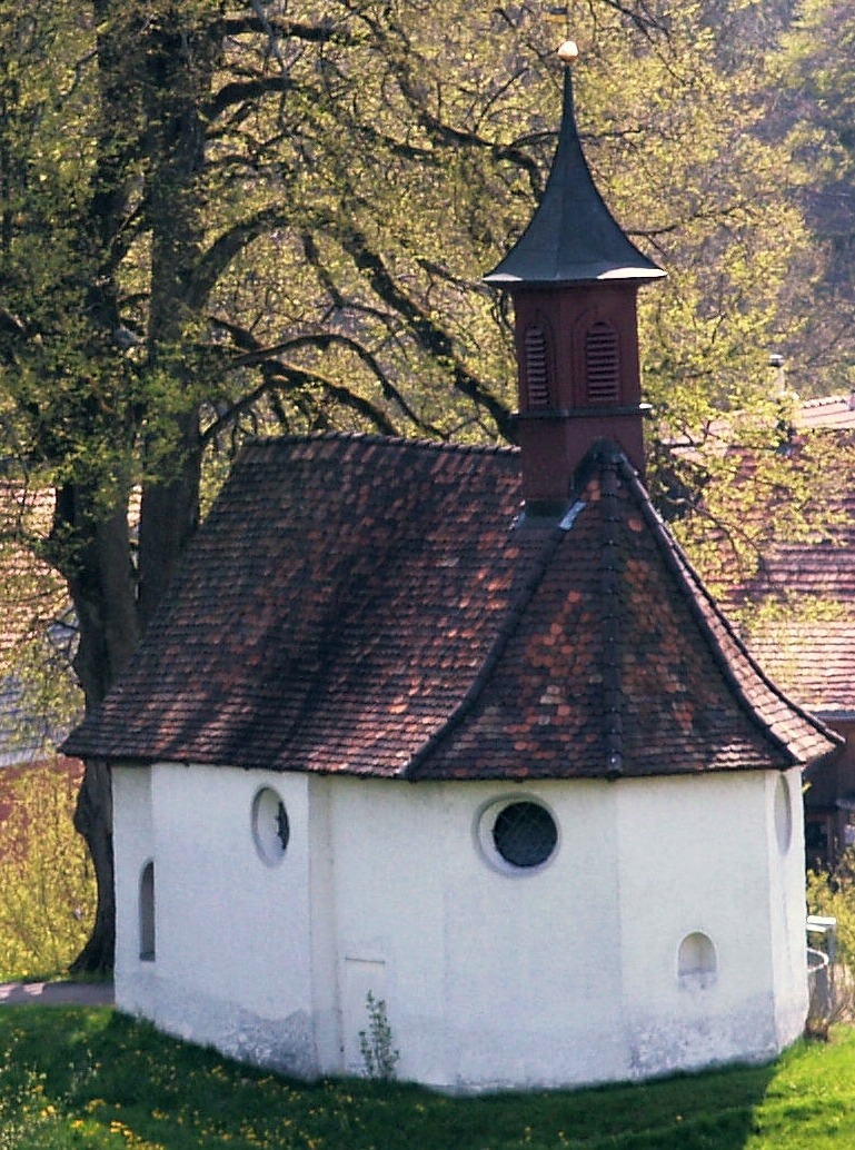 Kapelle St. Wolfgang, St. Gallen